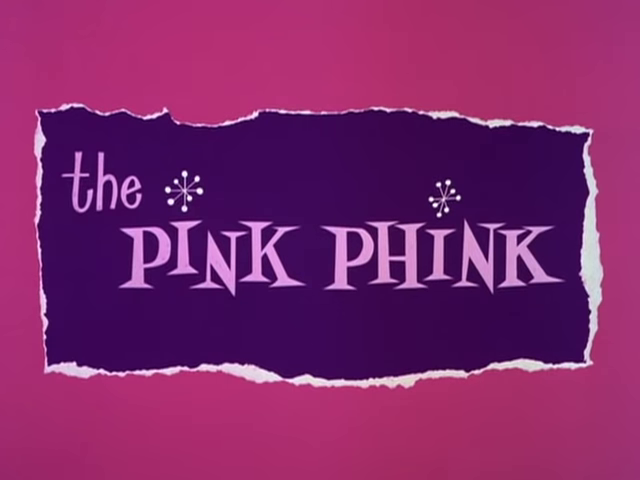 Ecran-titre de La Vie en rose.